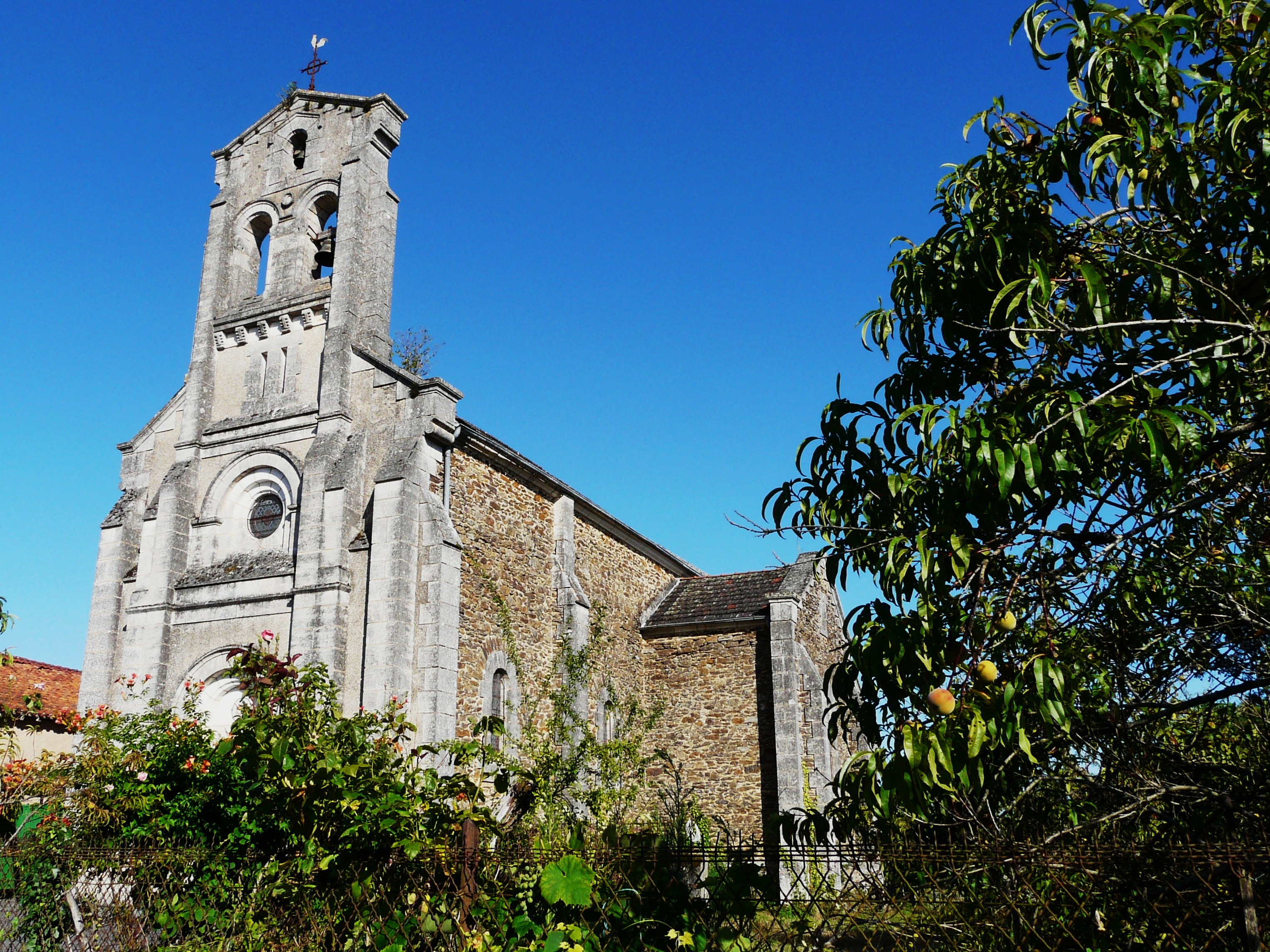 L'église Notre-Dame de la Nativité, à Pierrefiche, Thiviers, Dordogne, France